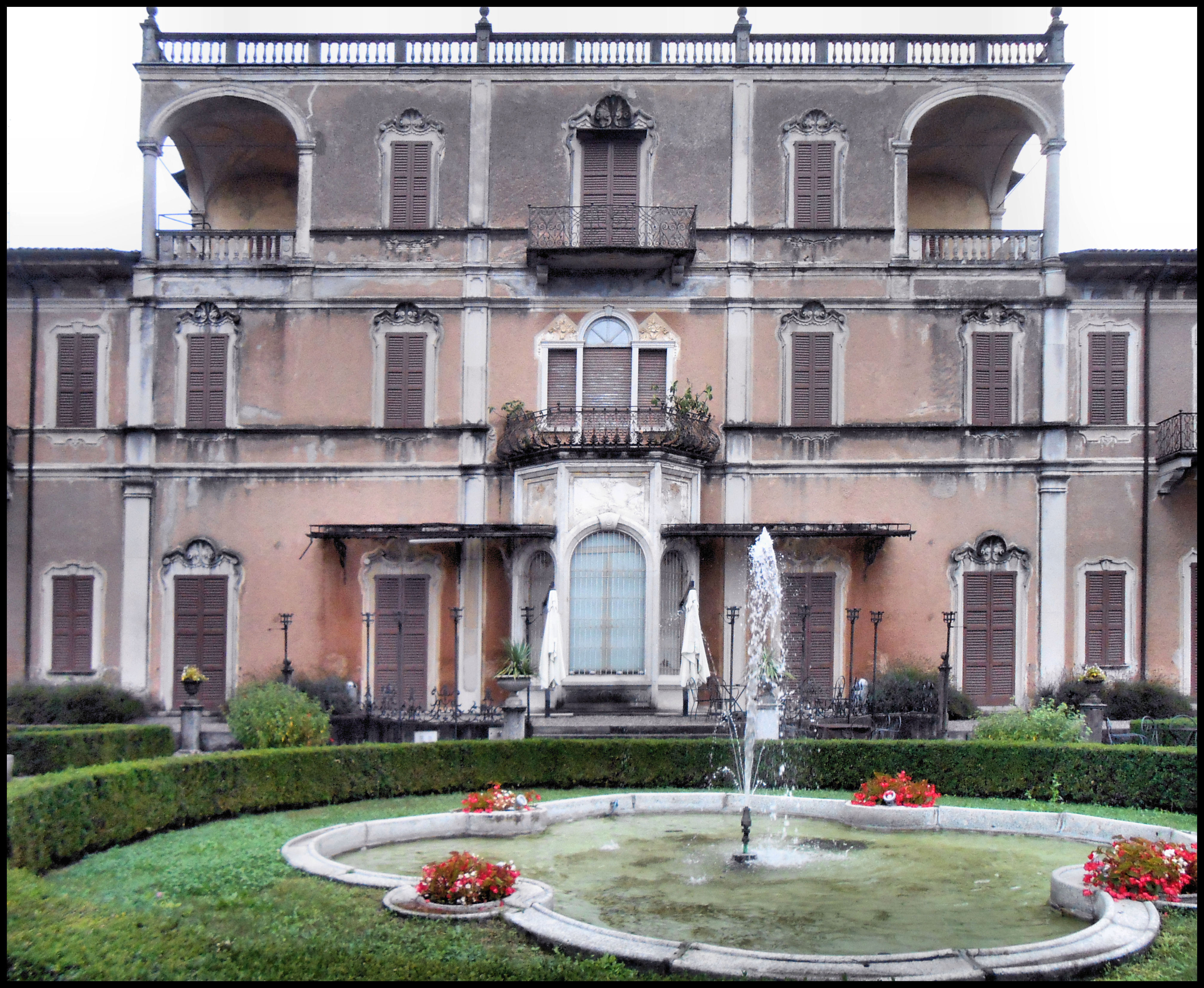 Gazzada - Parco di villa Cagnola - Complesso monumentale del XVIII secolo con parco collinare - Villa Cagnola - Park Villa Cagnola - Monumental complex of the eighteenth century with hillside park